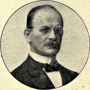 Dr. Hermann Lisco, Staatssekretär des Reichsjustizamts, 1913